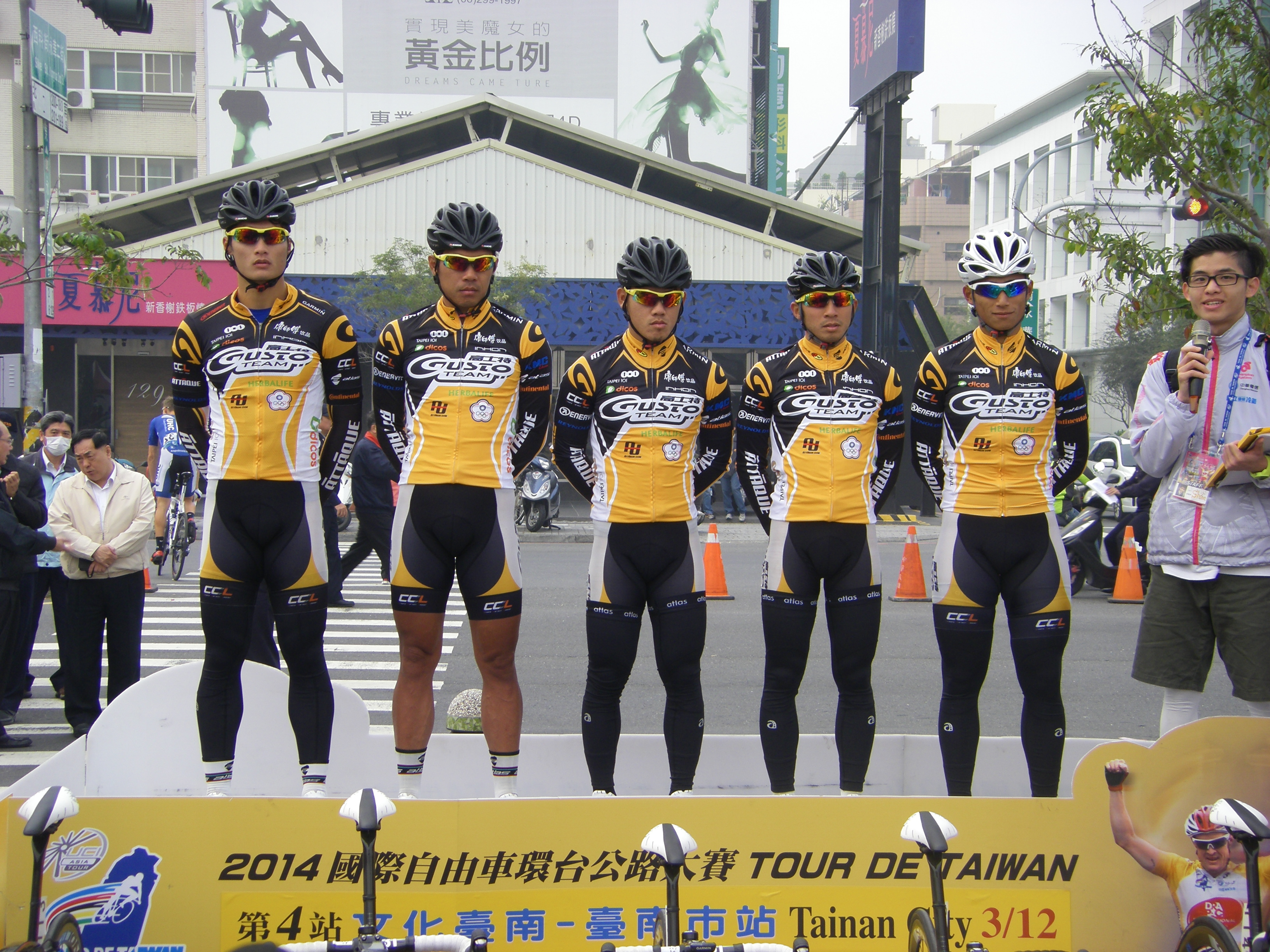 中文（台灣）: 高士特職業車隊(李偉誠、劉金峰、蕭世鑫、劉書銘、馮俊凱)在2014年國際自由車環台公路大賽第四站